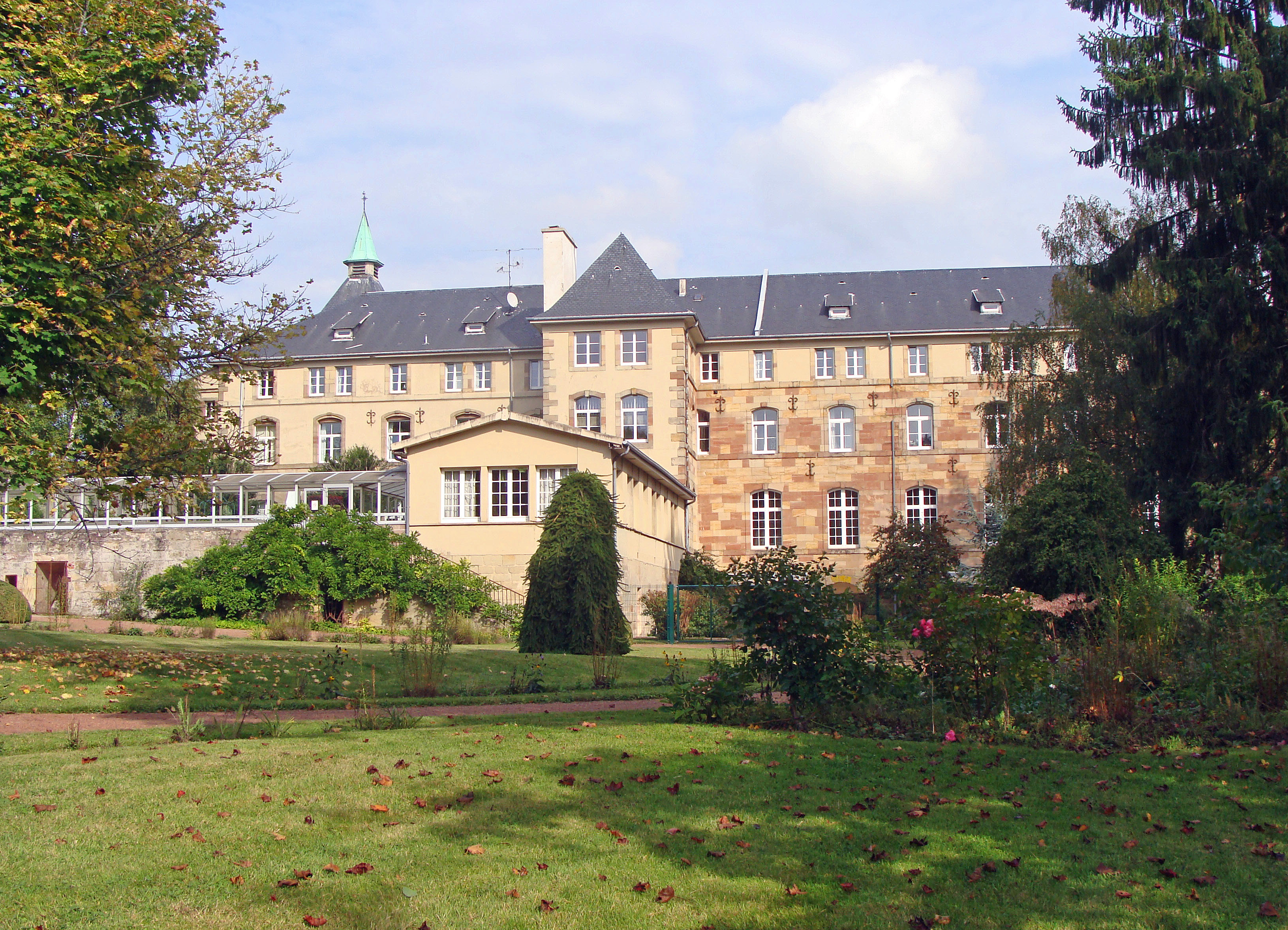 Abbaye Saint-Martin-des-Glandières de Longeville-lès-Saint-Avold (Moselle).